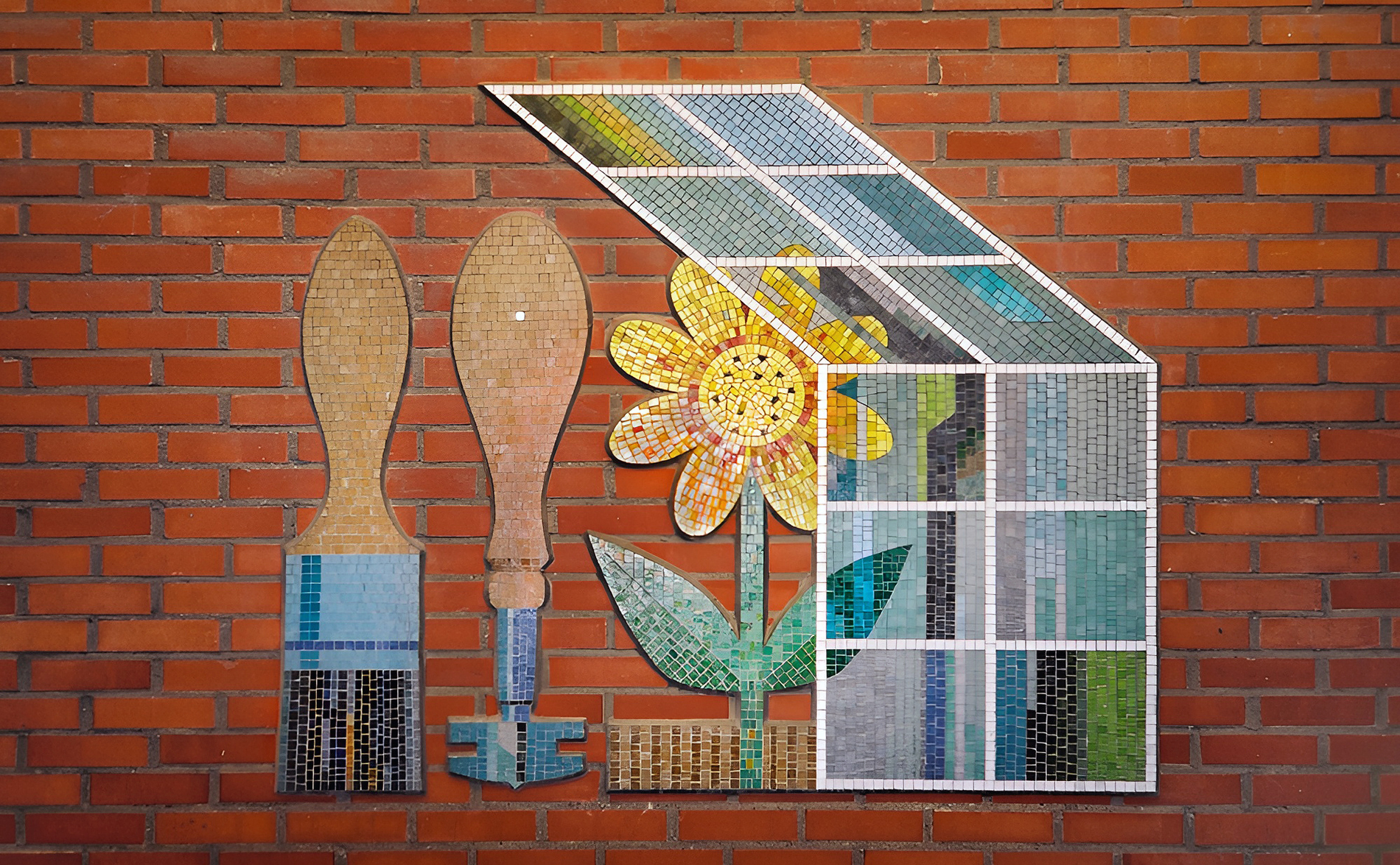 Mosaik på husgavel i Malmö. Från tidigt 1960 tal för firma i färg, glas och trädgårds branschen.